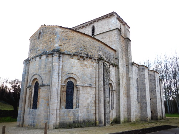 L'église Saint-Eugène et Sainte-Marthe de Xaintray dans les Deux-Sèvres.